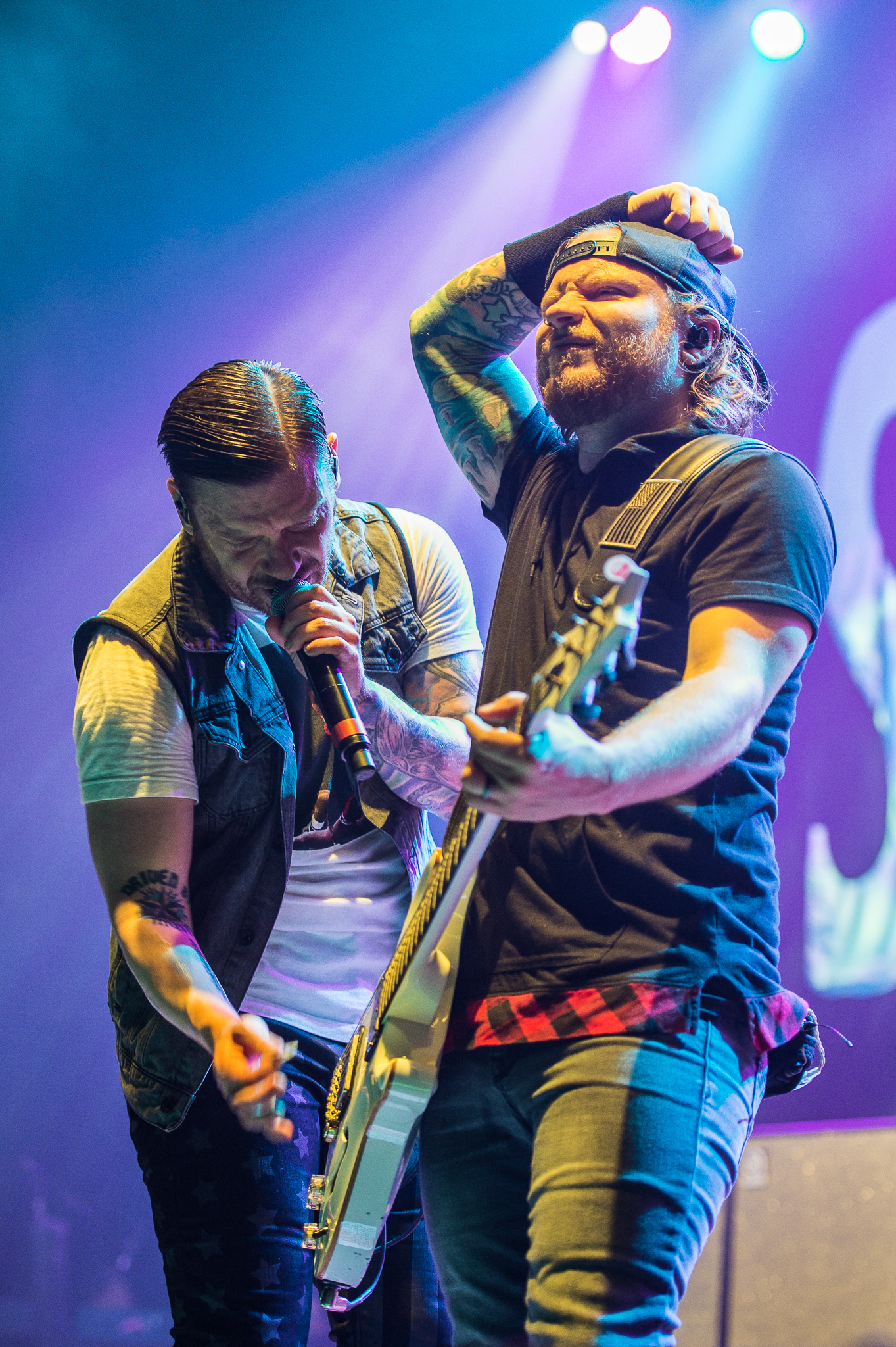 ARGO-Konzerte,Alternarena,Brent Smith,Festival,Konzert,Livekonzert,Livemusik,Musik,RiP,Rock im Park 2016,Shinedown,Zach Myers